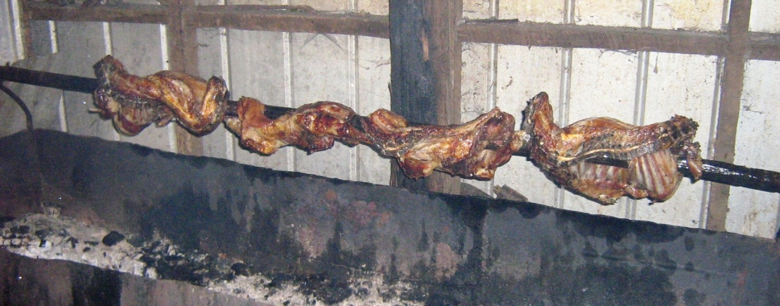 Asado de cordero al palo en Chiloé, Chile.